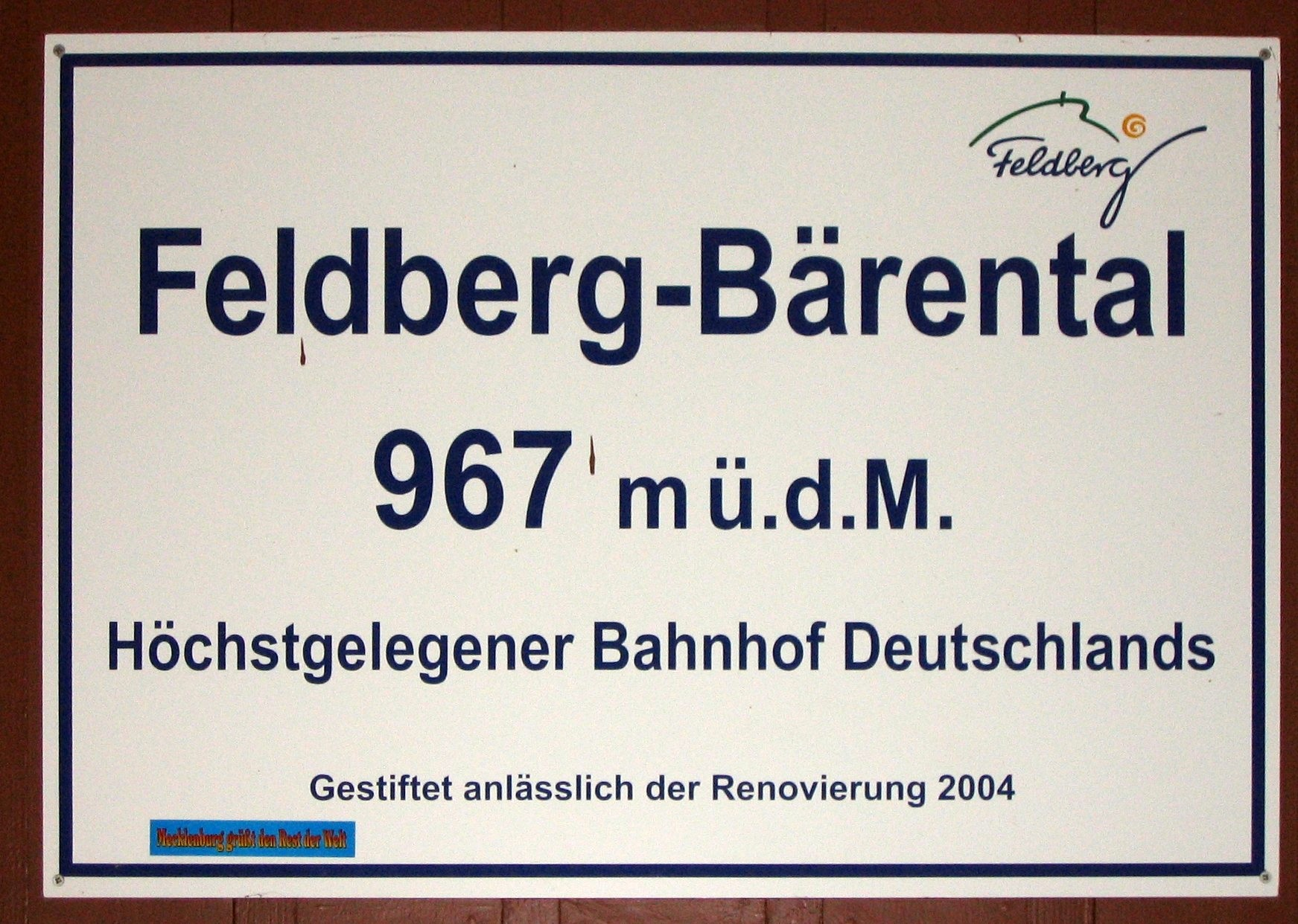 Schild am Bahnhof Feldberg-Bärental